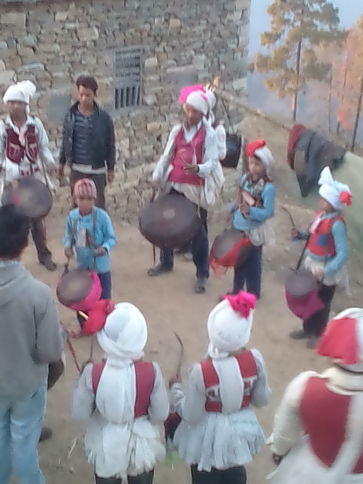 नेपाली: दैलेख जिल्लाको एक विवाहमा प्रदर्शन गरिएको पञ्चेबाजा डोटेली: दैलेख जिल्लाअ एक ब्यामी नाच्न लाग्याआ पञ्चेबाजा